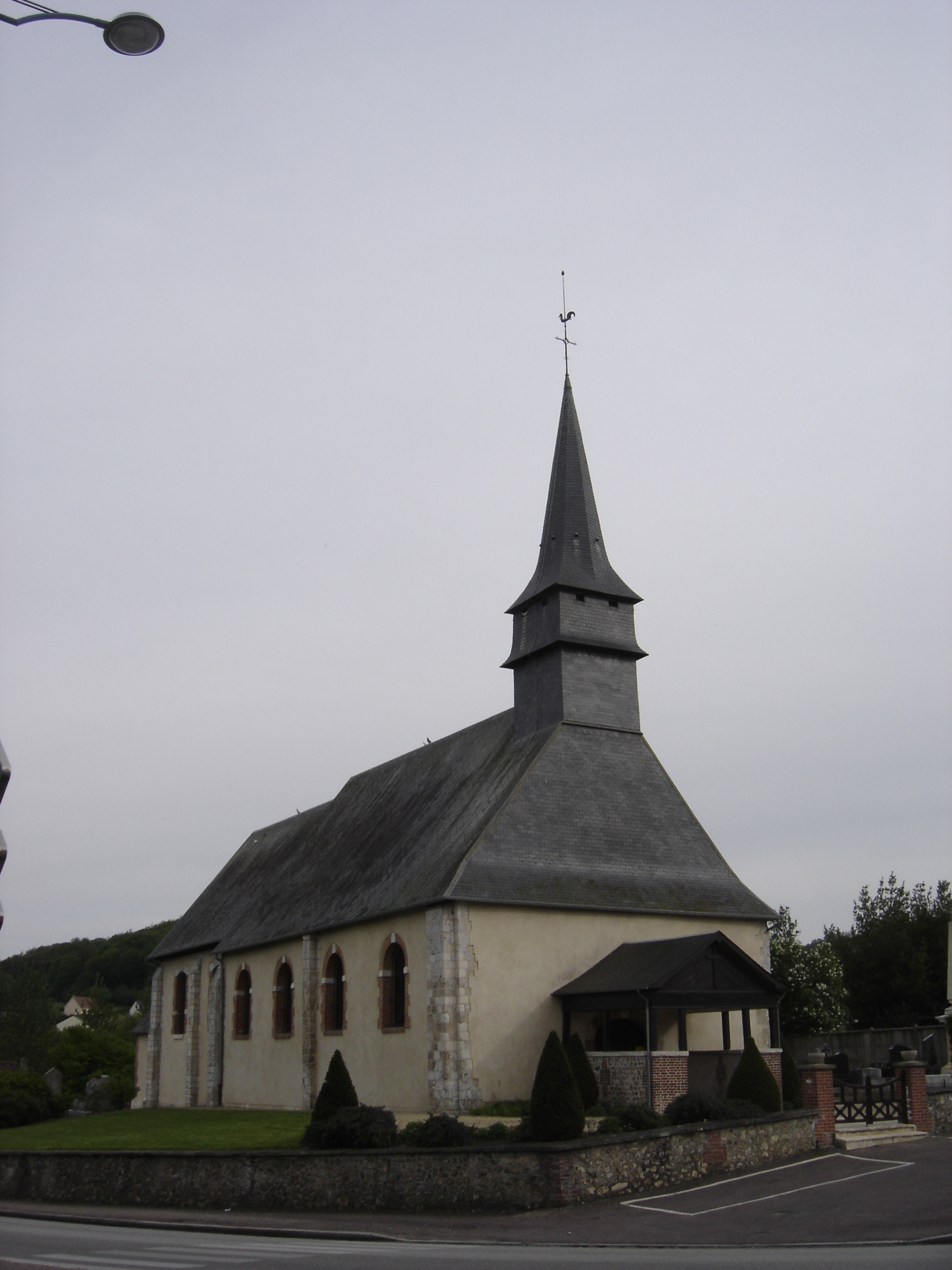 Eglise de Toutainville.